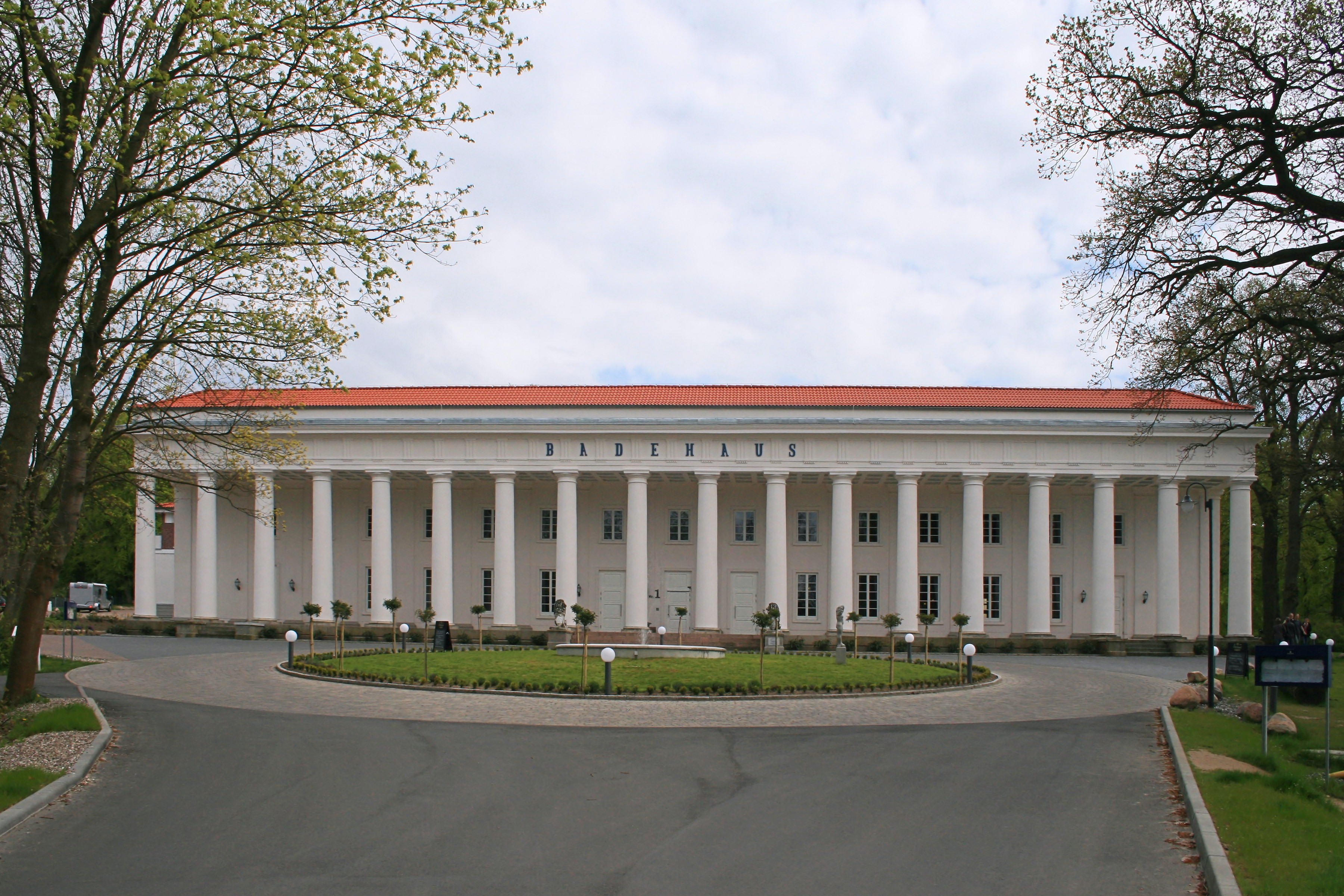 Badehaus Goor bei Putbus auf der Insel Rügen nach der Rekonstruktion. Ostern 2007 wurde es als Kurhotel wiedereröffnet.